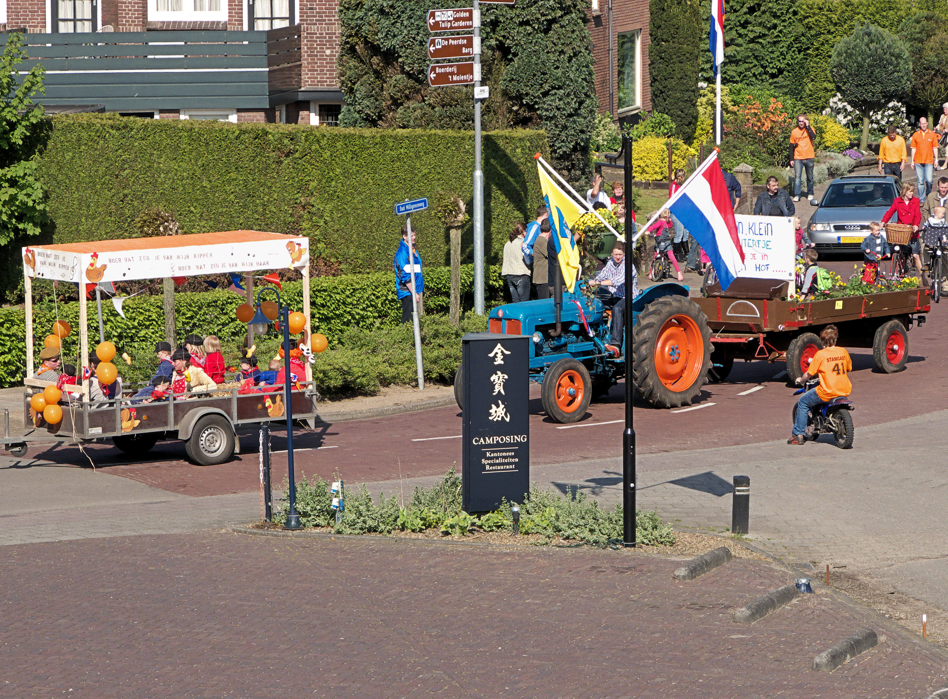 Koninginnedag 2009 in Garderen, Gelderland, Nederland